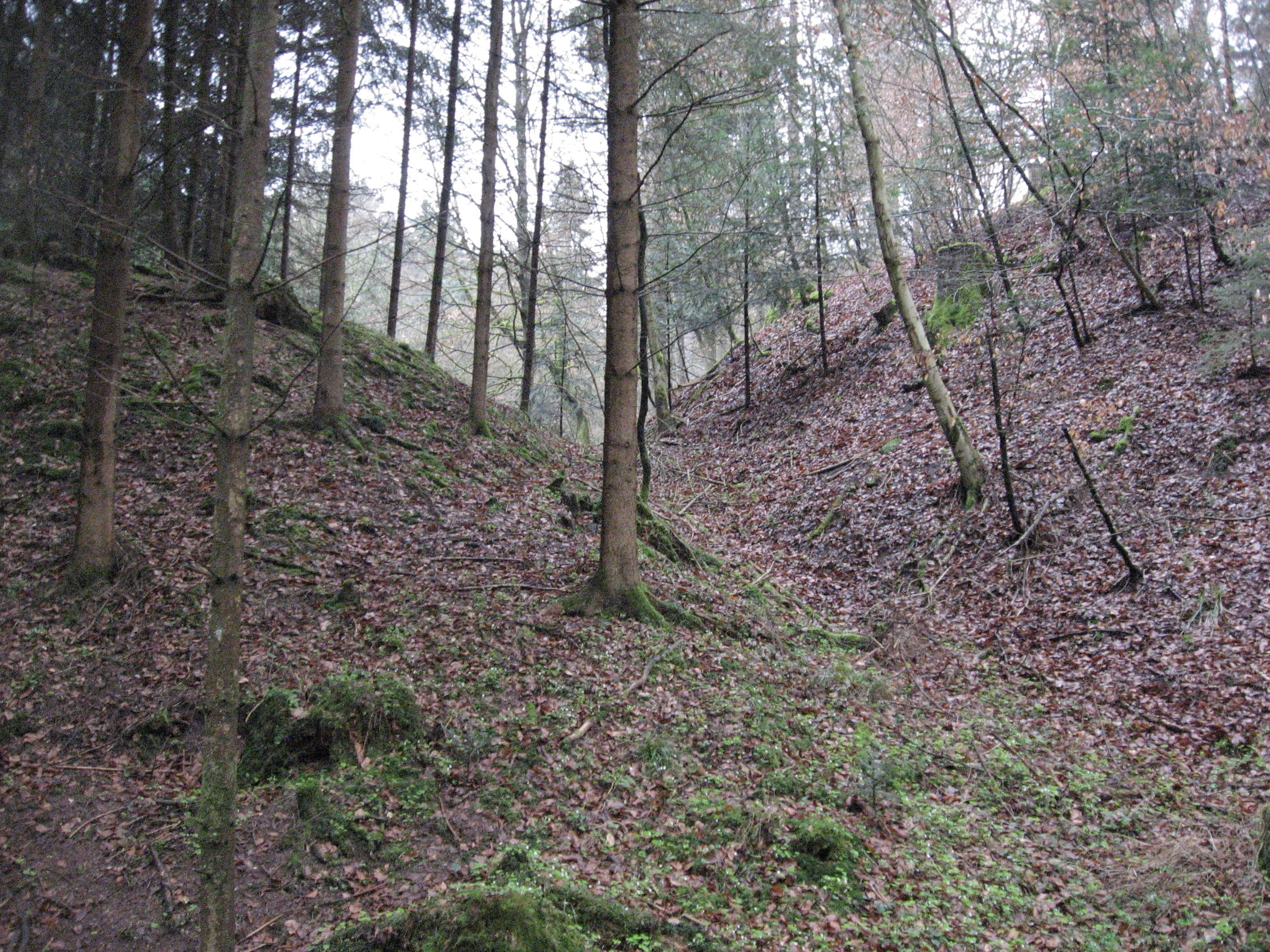 Burgstall Holenstein südlich von Bühlerzell-Holenstein. Blick aus der kleinen Talmulde eines vor dem Hügel in den Reutebach mündenden Bachs nach E auf die hintere Scharte des Burghügels, die ihn vom nach rechts hin stark weiter ansteigenden Hang abtrennt.